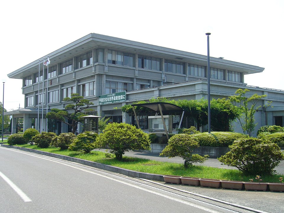 平泉町役場 2006年8月8日 Bakkai撮影